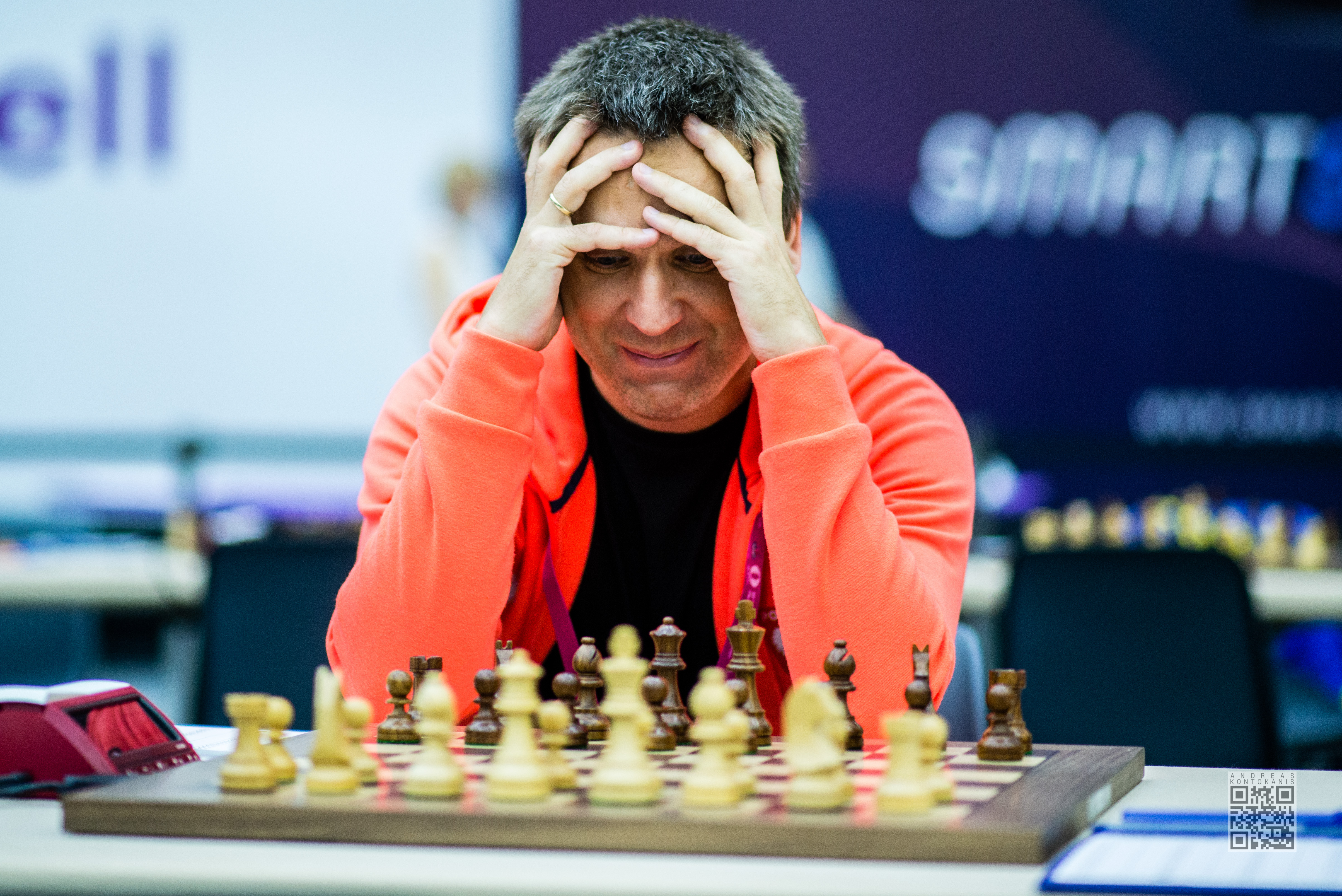 Bartosz Socko thinks